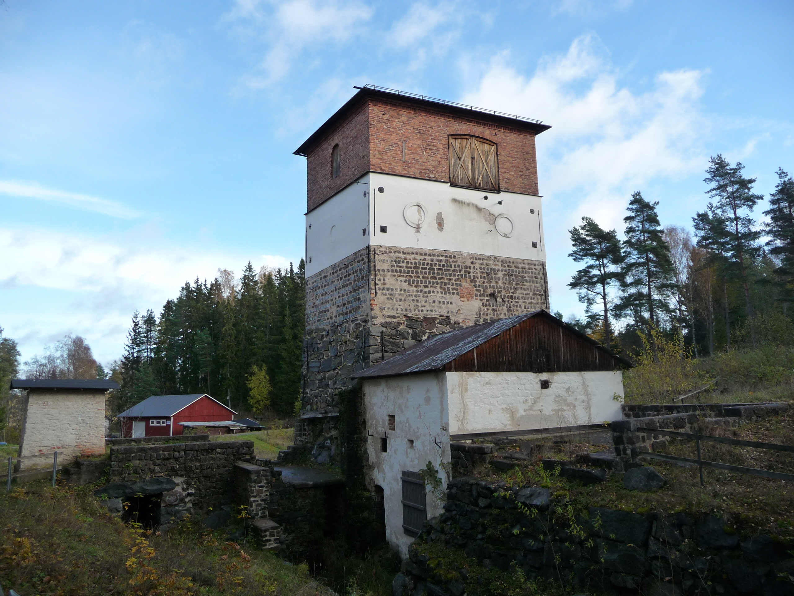 Museimasugnen vid Edsbro i Uppland.